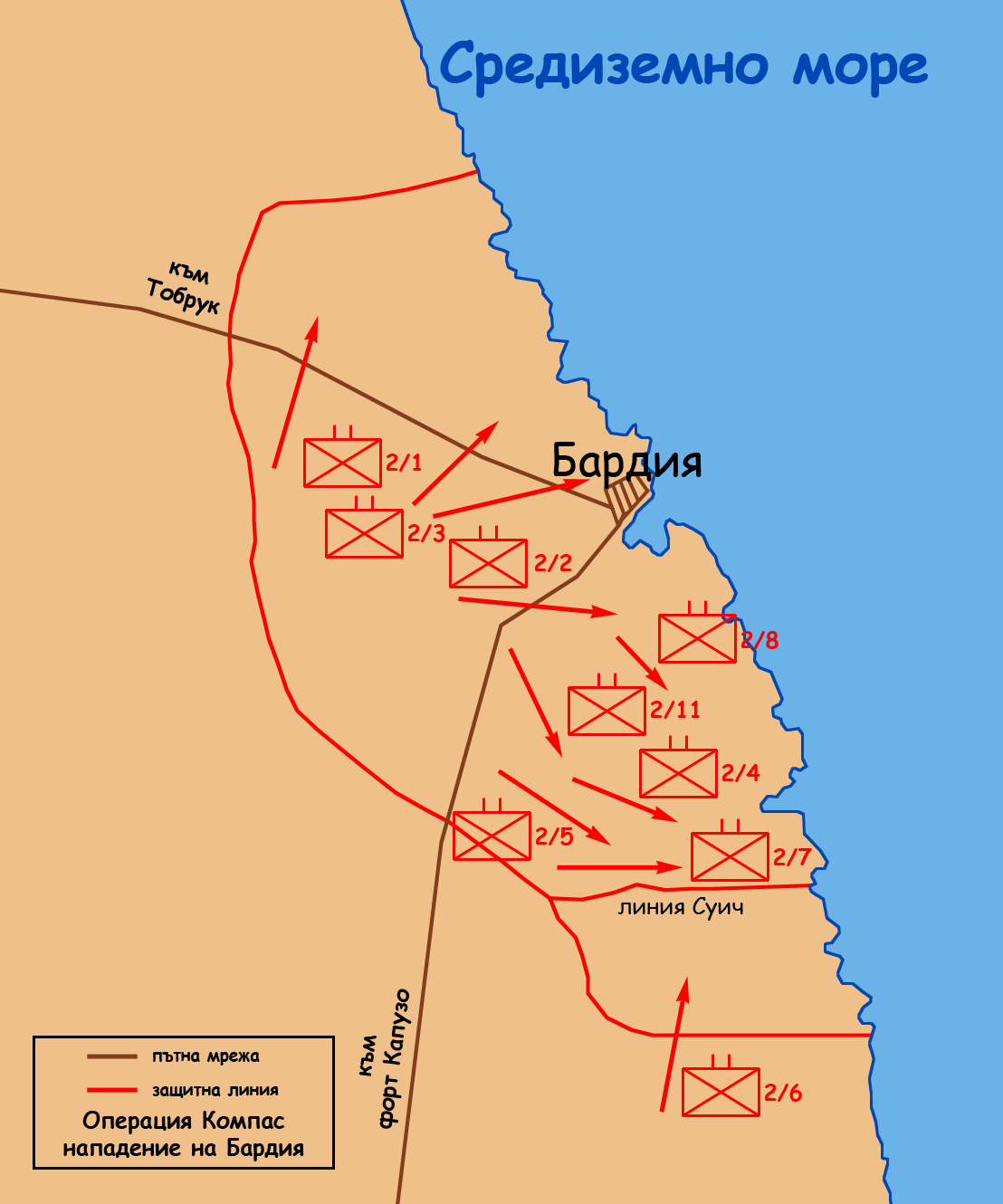 Операция Компас. Нападението на Бардия.